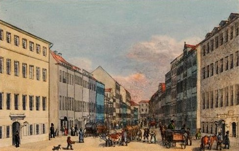 Blick in die Scheffelgasse am Altmarkt in Dresden, nach Westen, mit dem Gasthof "Zum Deutschen Haus" rechts